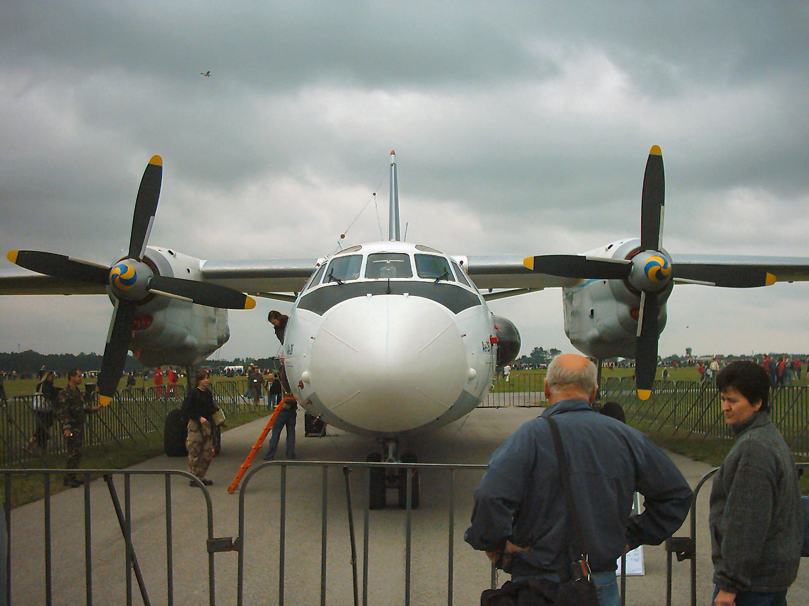 An-26 na pokazach AirShow 2007 w Radomiu.